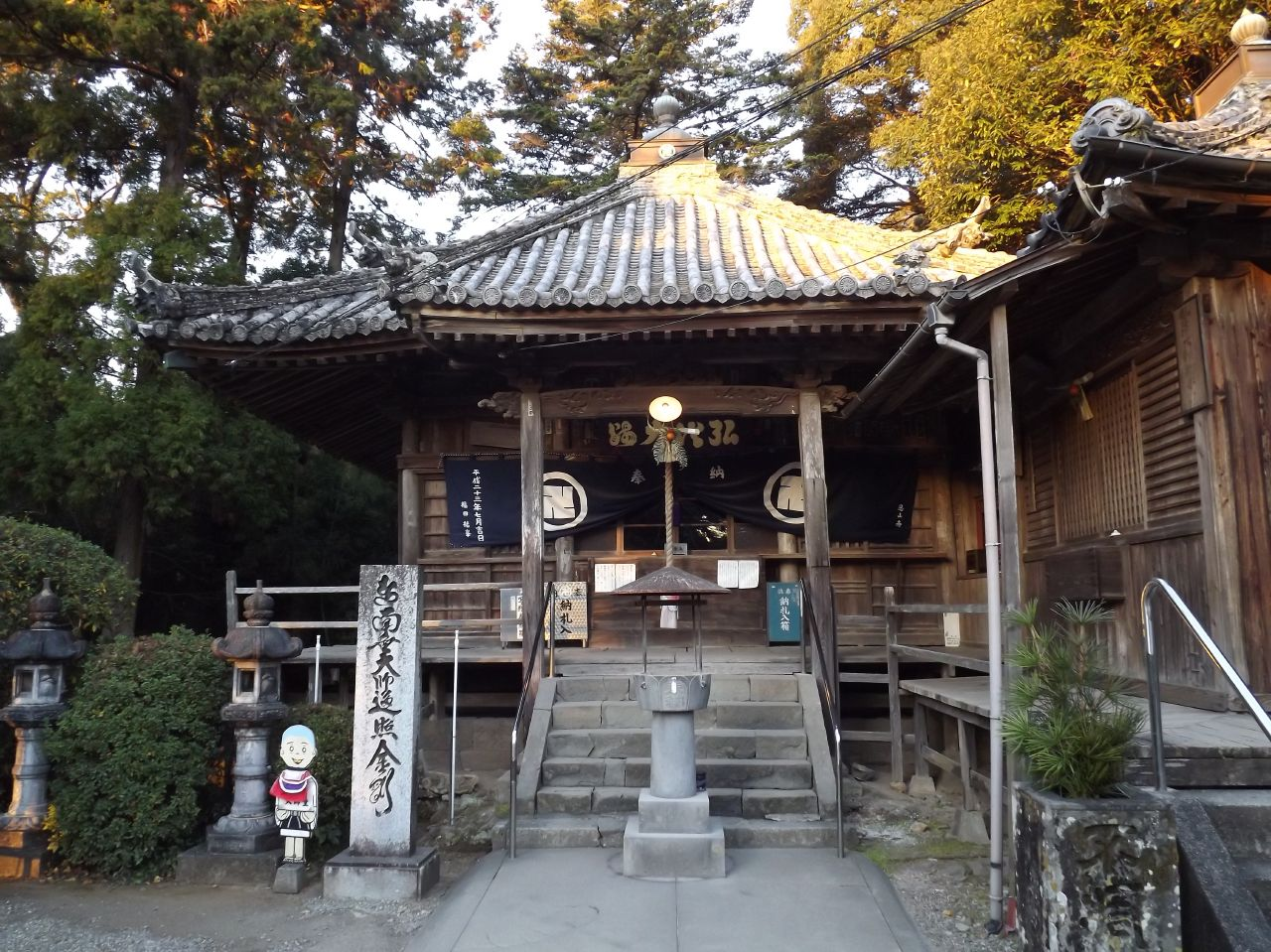 恩山寺の大師堂